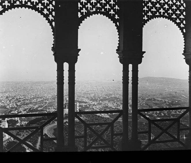 Imatge